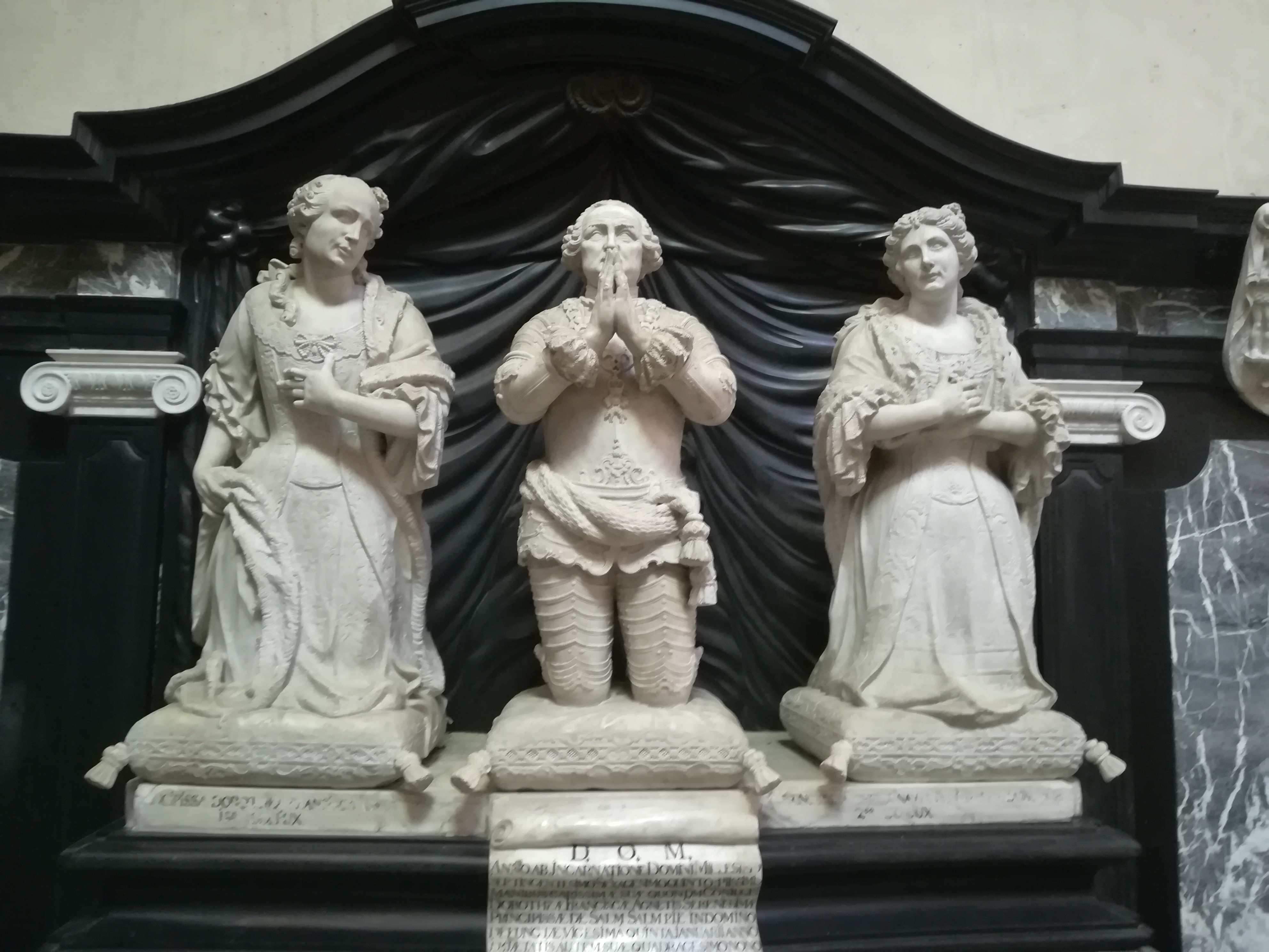 Praalgraf van Nikolaas Leopold van Salm Salm met de twee echtgenotes: Dorothea van Salm en Christina van Salm, gemaakt door Cornelis Van Dael - 1765